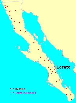 Mapa de la ruta de las misiones jesuitas.